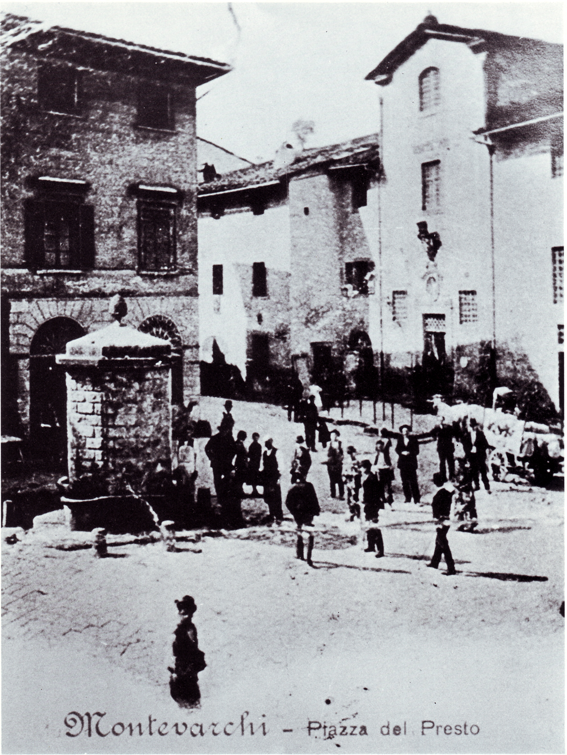 Montevarchi: Piazza Presto, now Piazza Umberto I